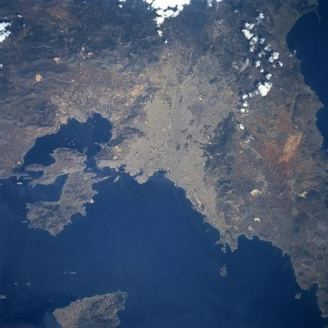 Athene - satellietopname van NASA. Oosten boven.